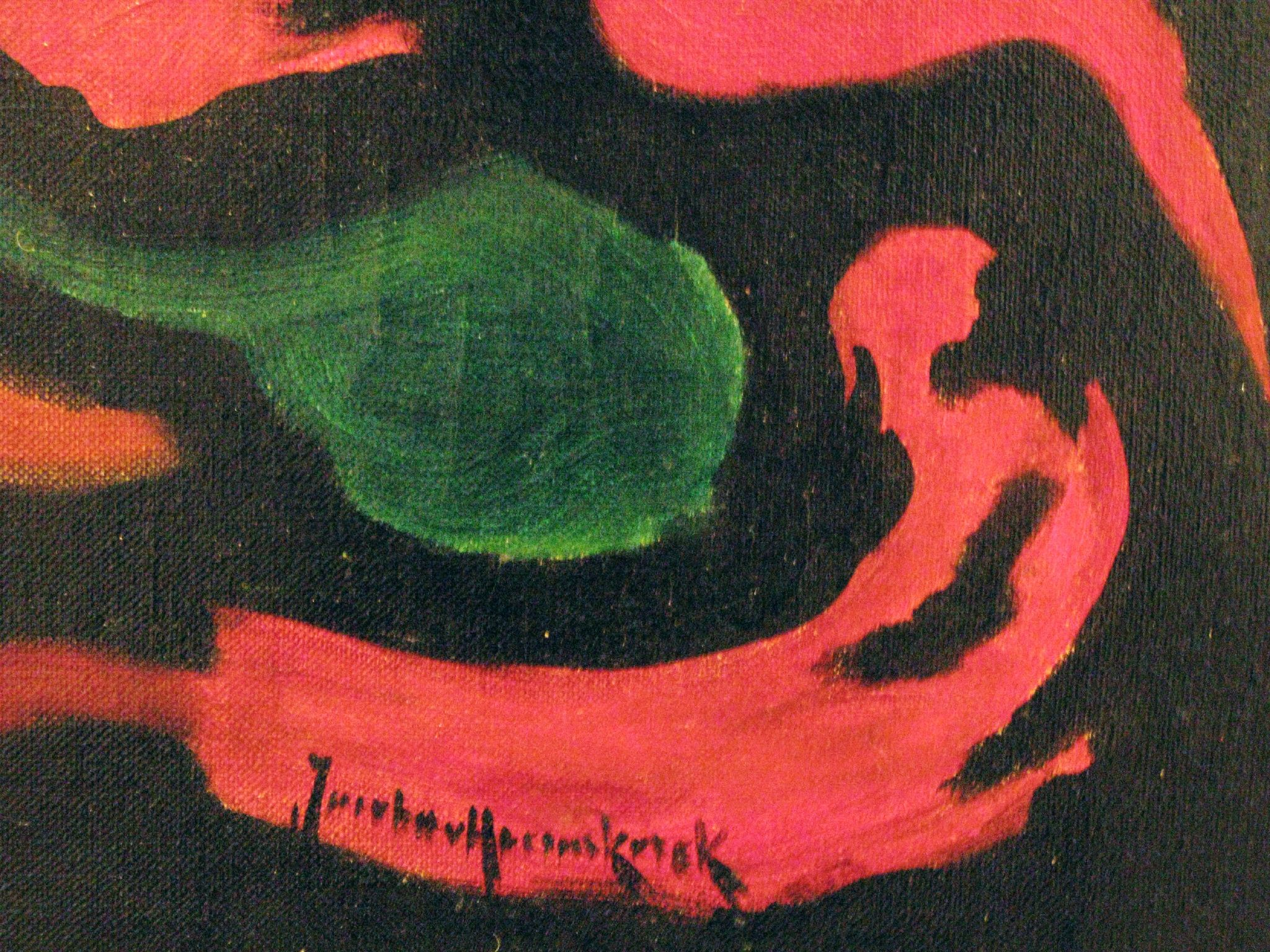 Bild 124 detail